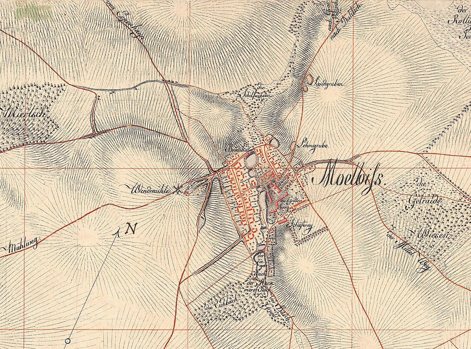 Mölbis um 1800 (Ausschnitt aus Meilenblätter von Sachsen 1780-1806)